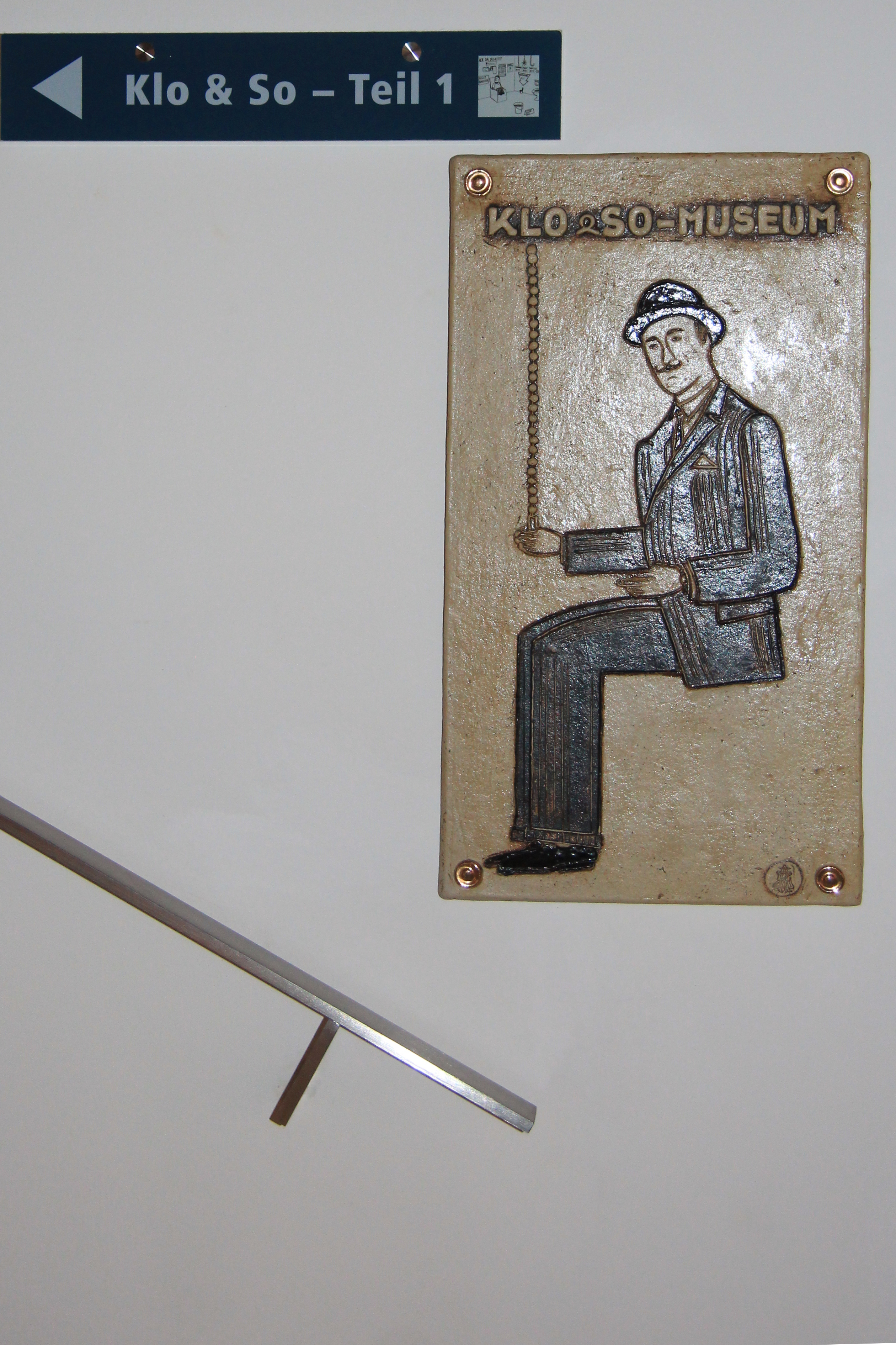 Ausstellungsstück(e) in den Kammerhofmuseen in Gmunden, Oberösterreich